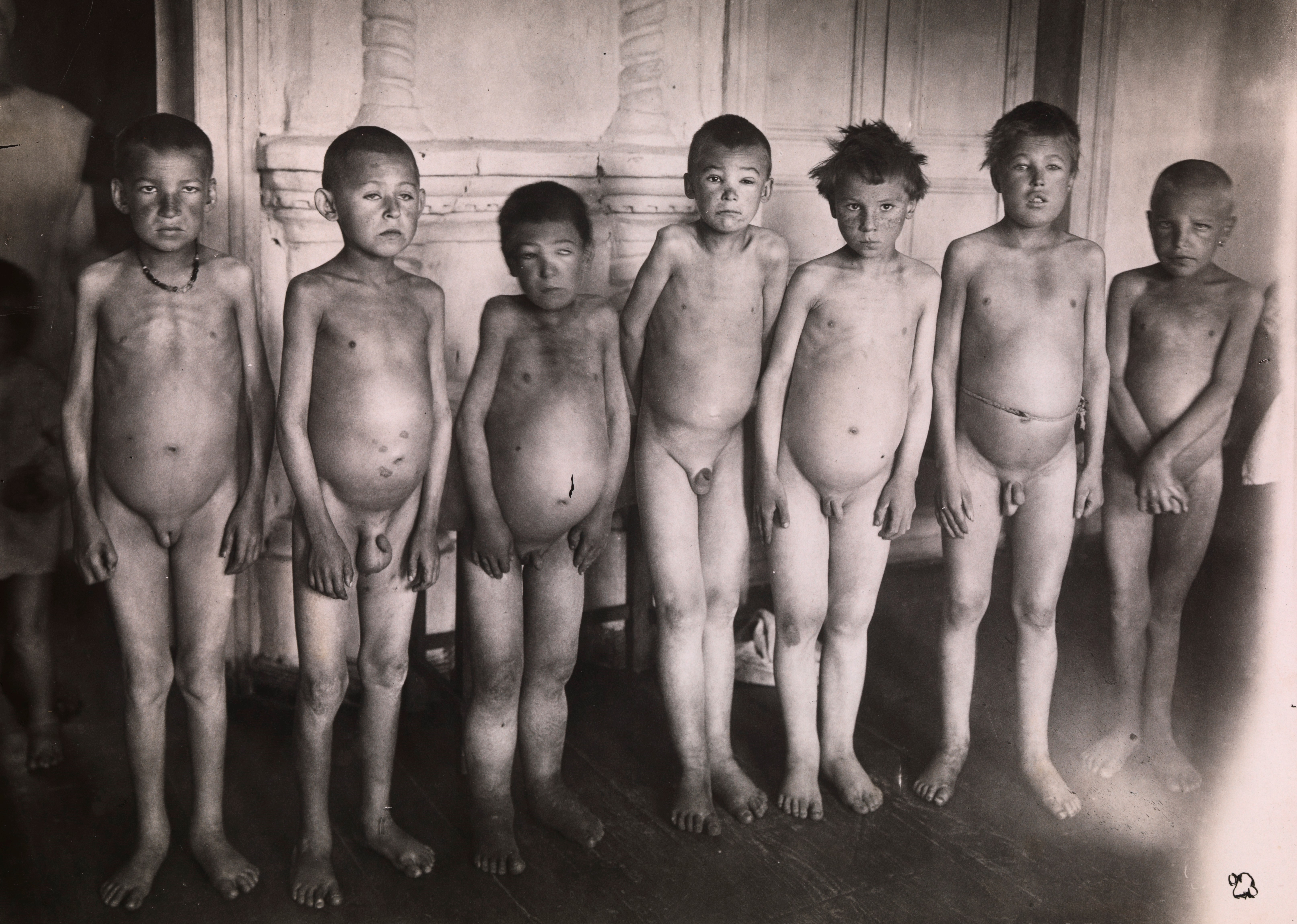 Barn med oppsvulmede kropper (på grunn av sult og underernæring) i et barnesykehus i Stavropol. Depicted place: Russland, Toljatti